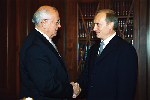 МОСКВА, КРЕМЛЬ. С экс-президентом СССР Михаилом Горбачевым.